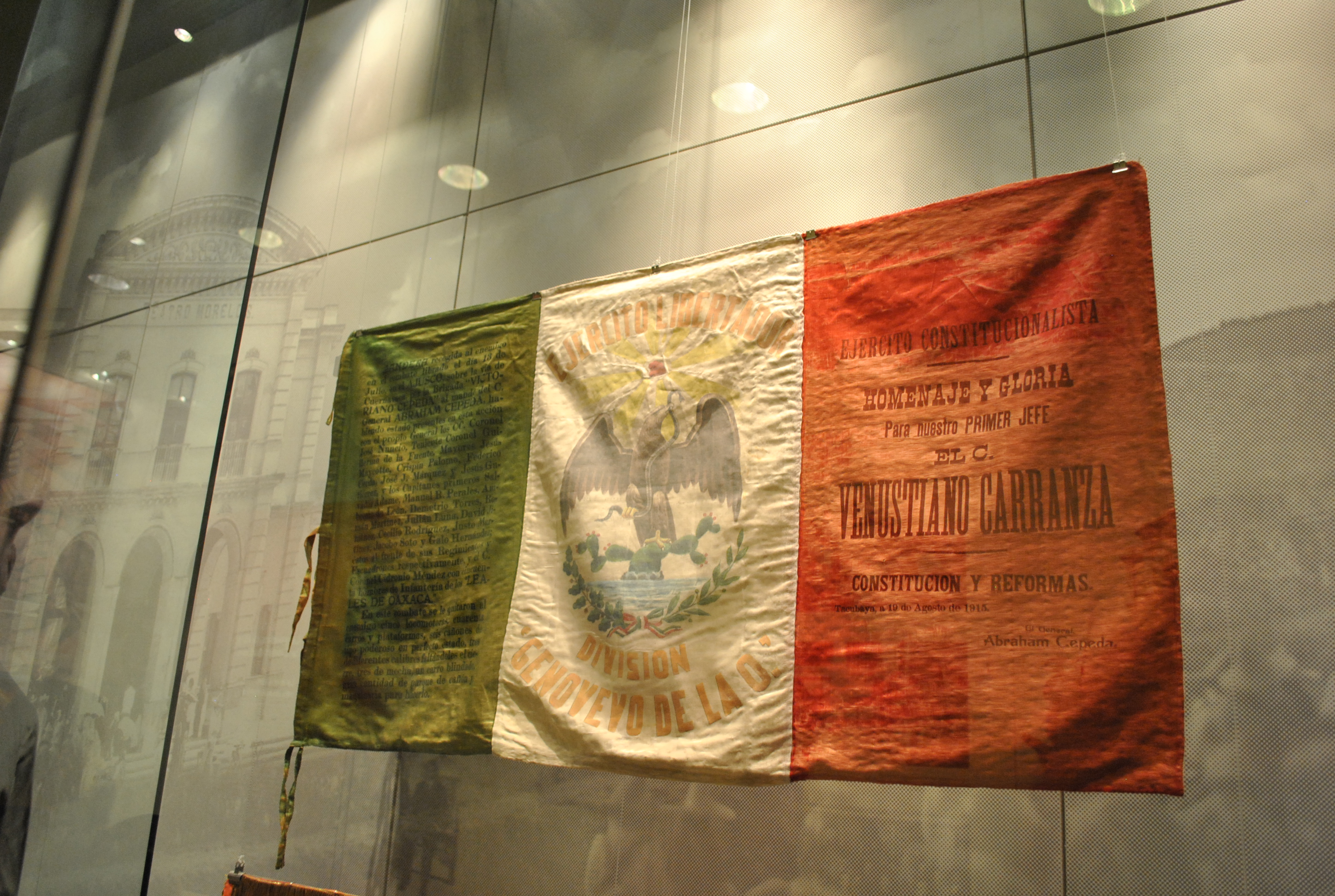 Bandera de la División "Genovevo de la O" del Ejército Constitucionalista